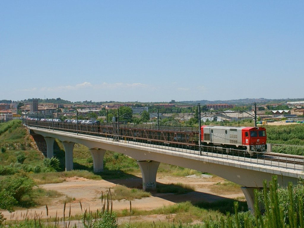 La crisi en el sector del automòbil, ha fet que l'Autometro anés mes buit del normal. A la foto, la 254.03 passant sobre el pont que creua el riu Llobregat en direcció la Zona Franca. La crisis en el sector del automóvil, hizo que el Autometro fuera más vacío de lo normal. En la foto, la 254.03 pasando sobre el puente que cruza el río Llobregat en dirección la Zona Franca.